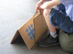 Nach getaner Arbeit beim Kirchentag in Hannover 2005, nimmt ein Helfer einen Papphocker mit nach Hause